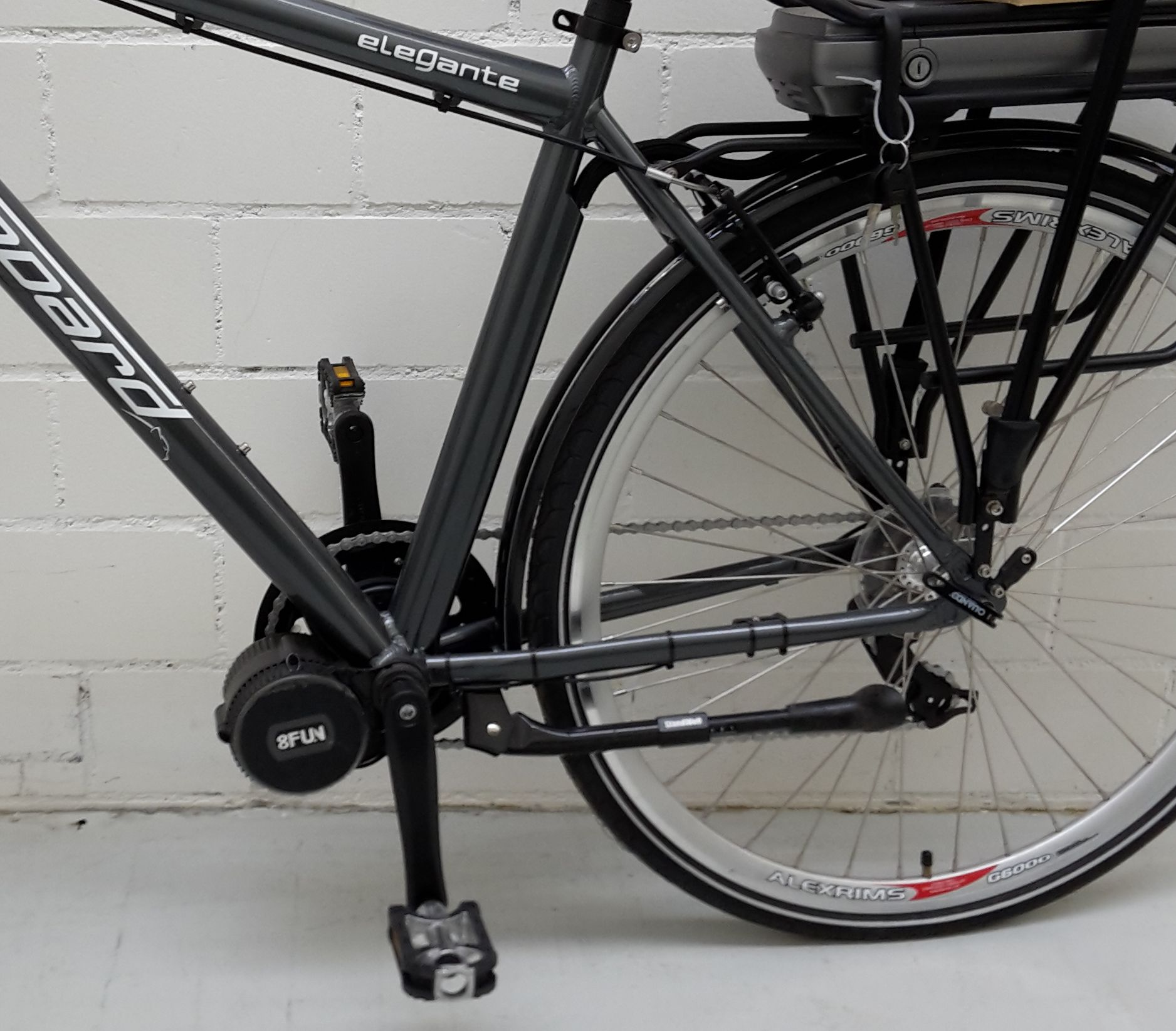 BAFANG: Mittelmotor, vor Tretlager montiert